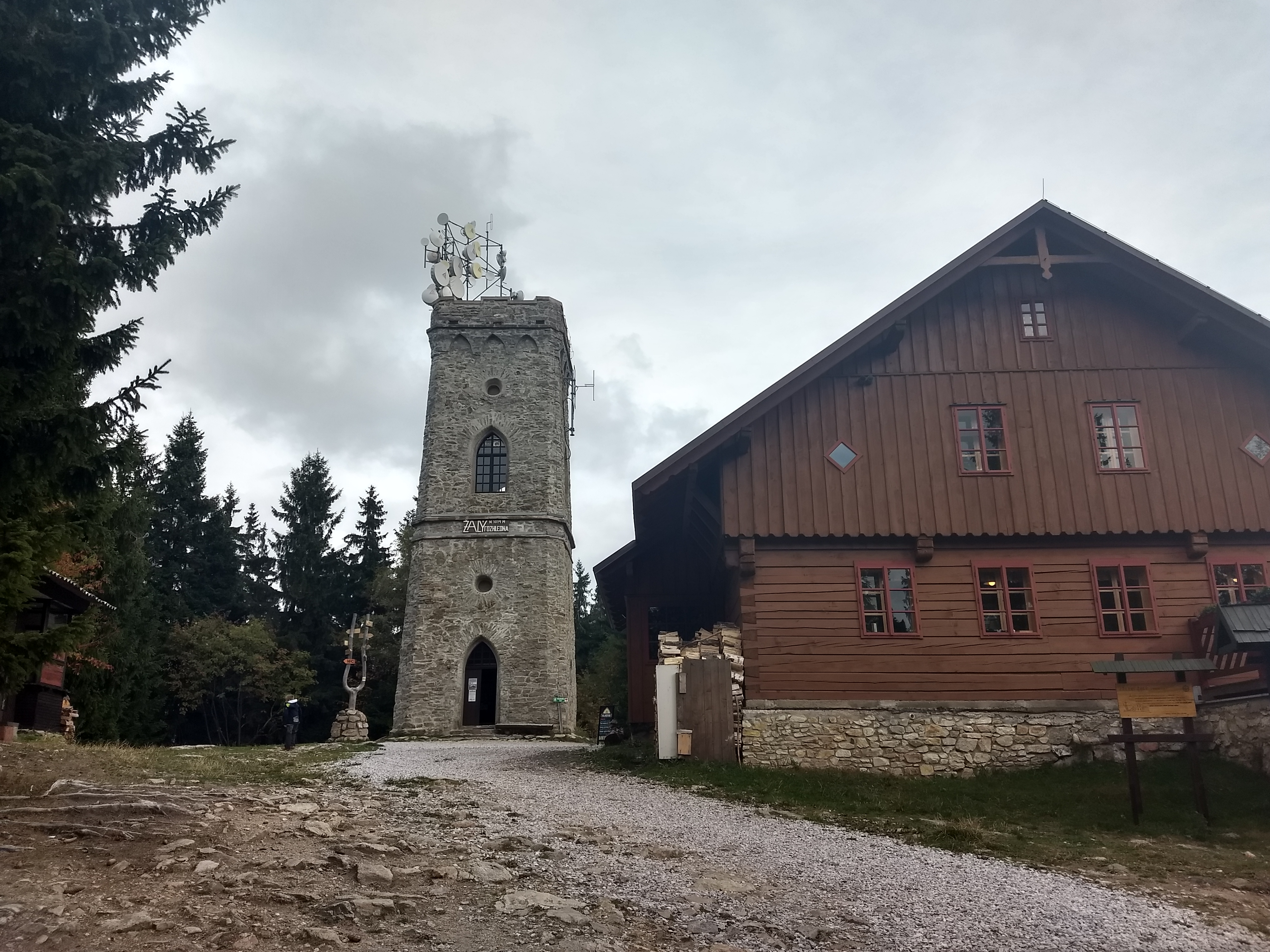 Rozhledna na vrcholu Přední Žalý